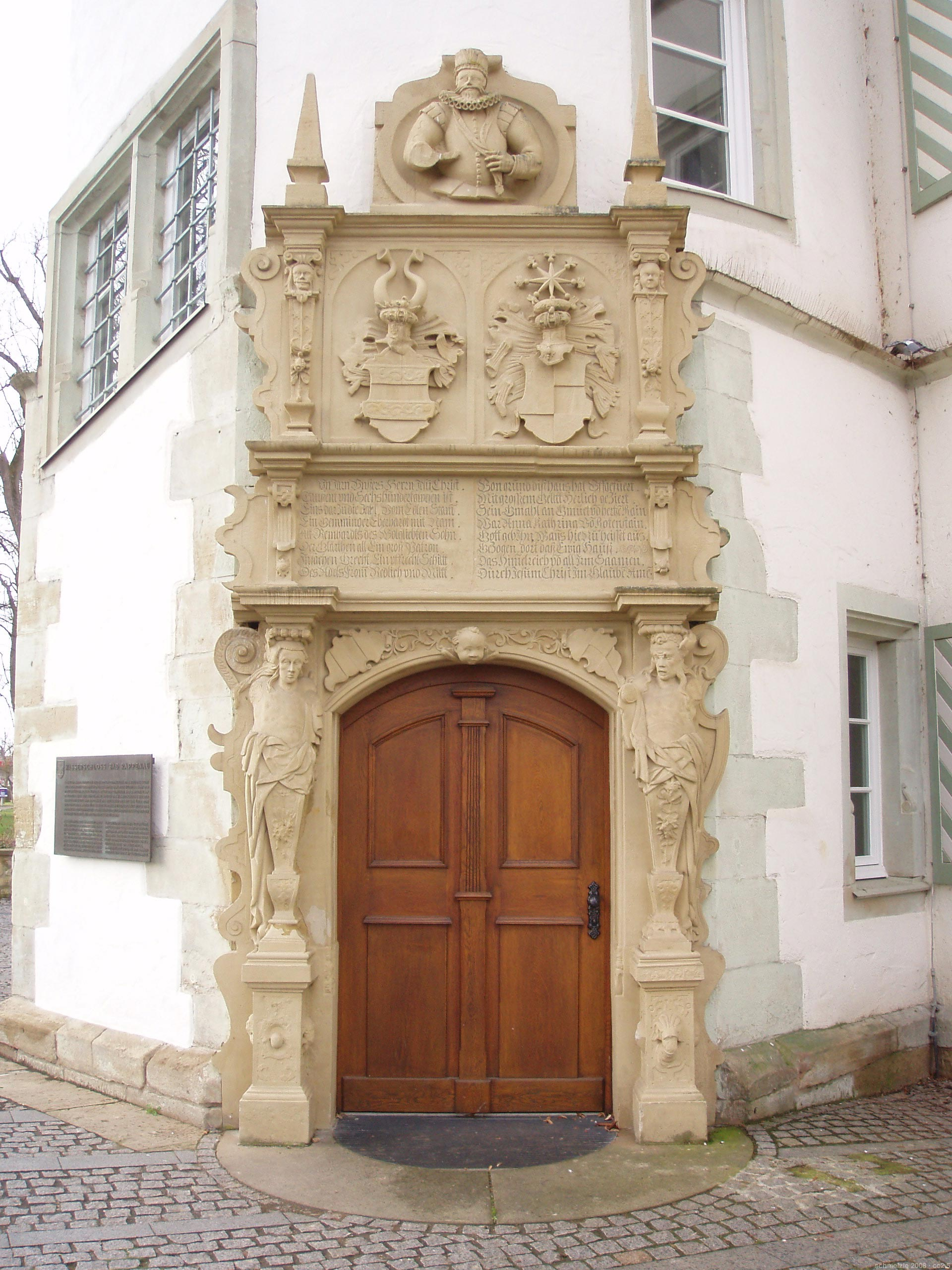 Portal des Wasserschlosses in Bad Rappenau, erbaut ab 1601 durch Eberhard von Gemmingen